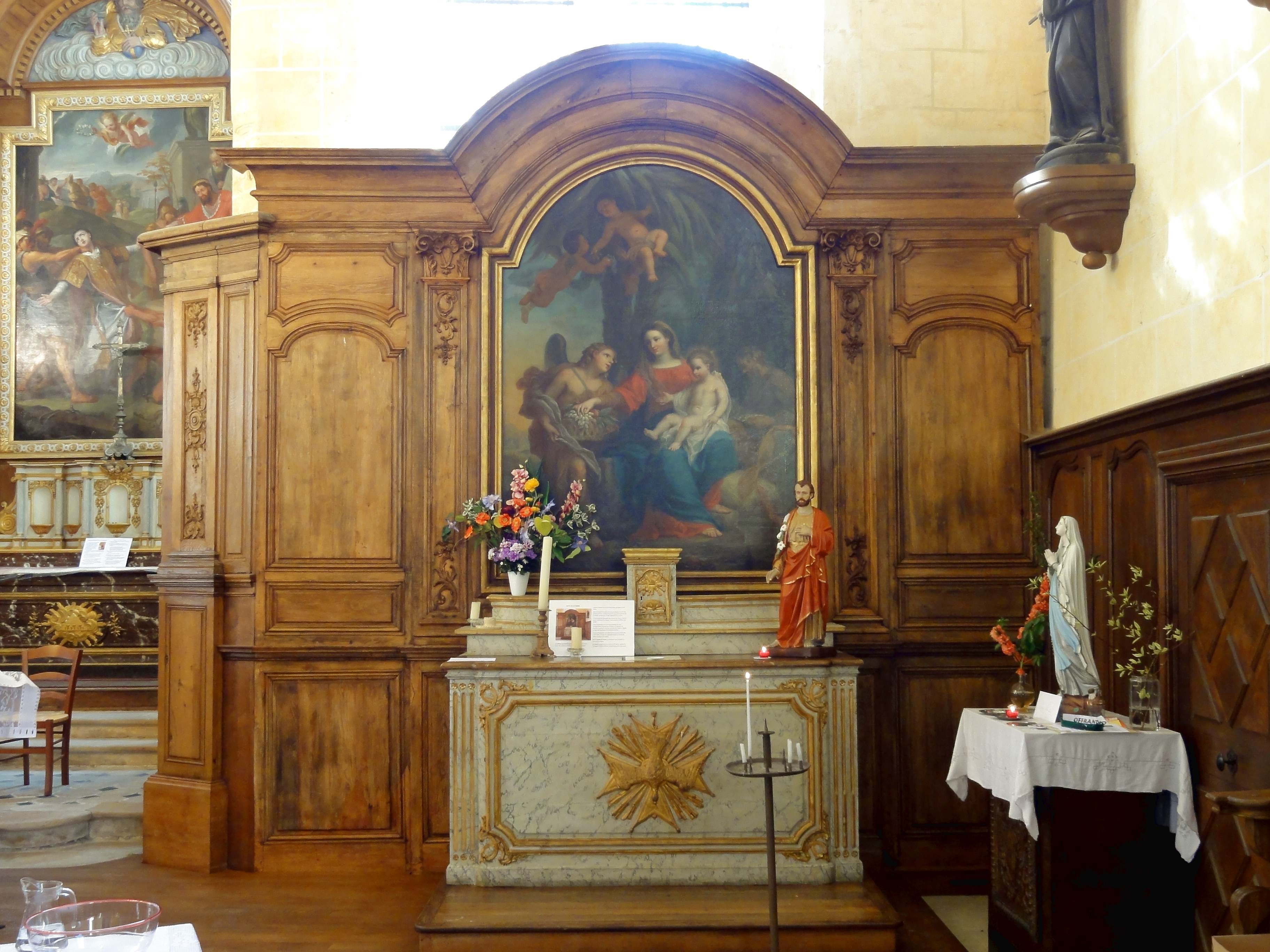 Mobilier de l'église (voir titre).